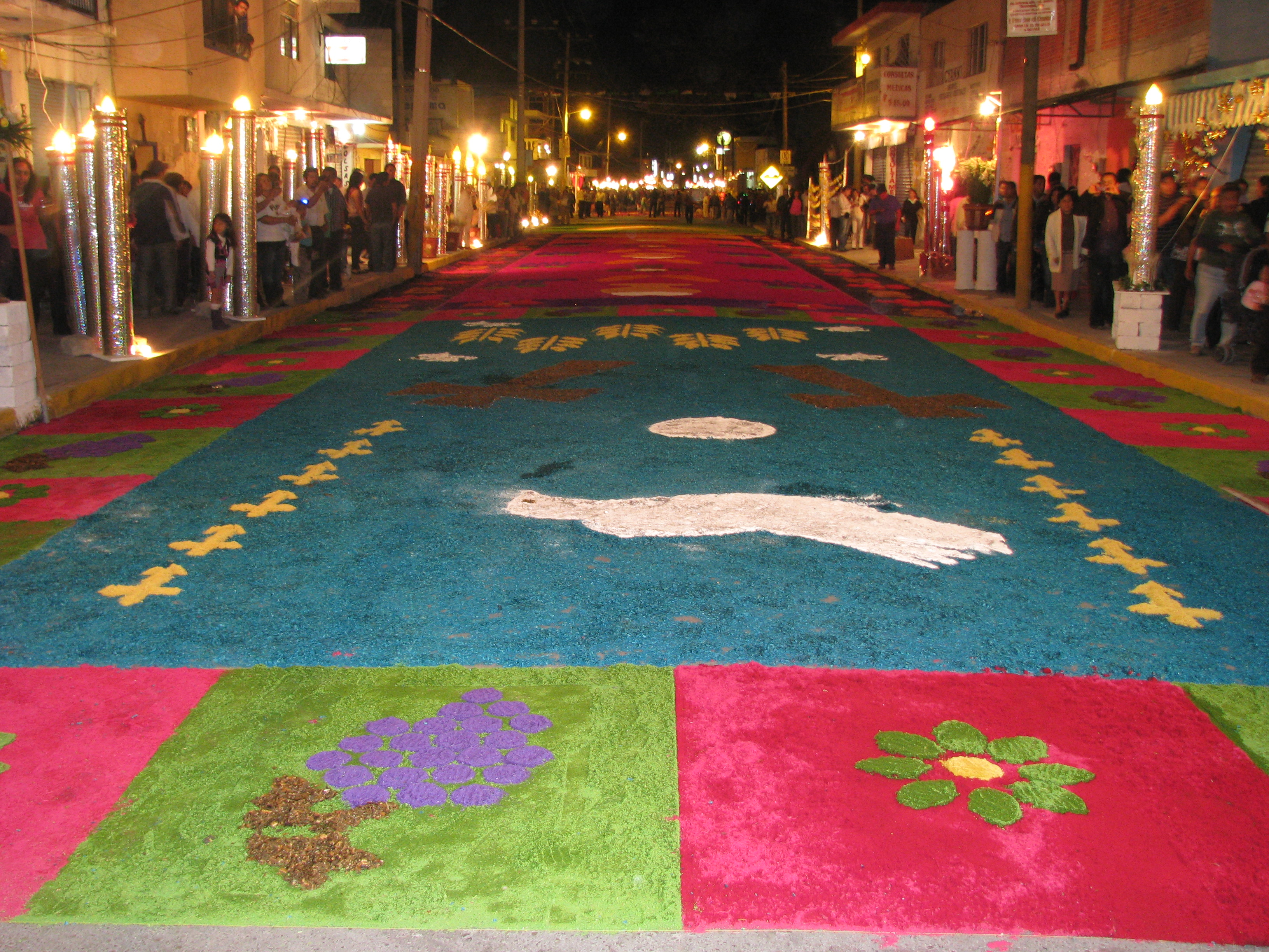 Imagen de una de las alfombras que se colocan en la celebracion de la Fiesta de Espigas en Tlaxcoapan